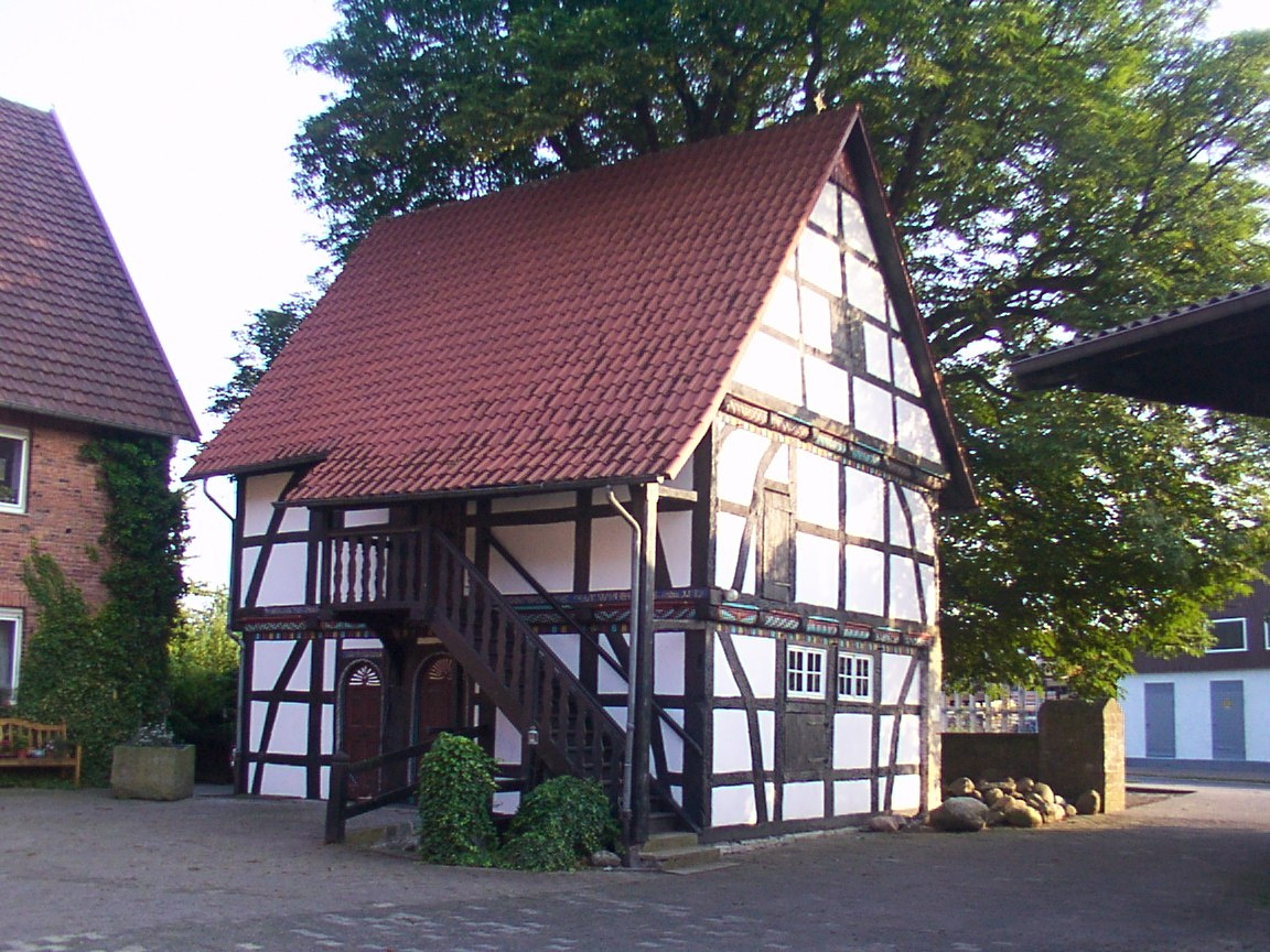 Salzkotten: Historischer Speicher in Scharmede This is a photograph of an architectural monument.